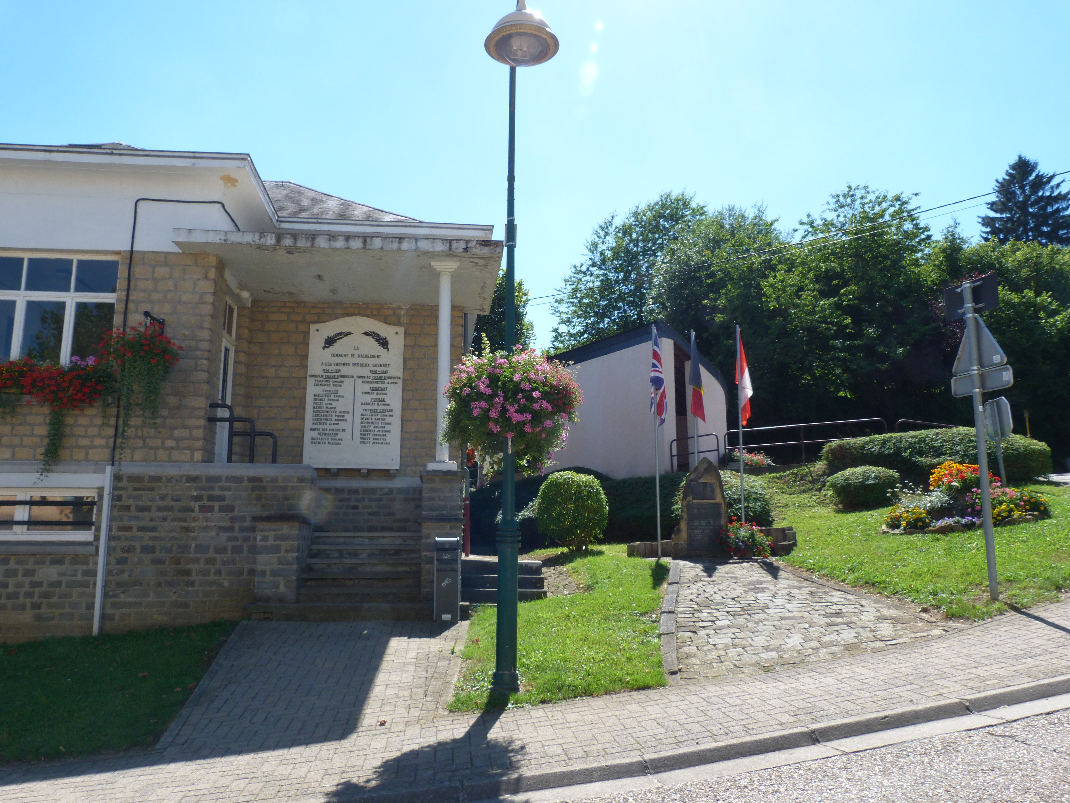 Le monument aux morts de l'ancienne commune de Rachecourt en août 2013.